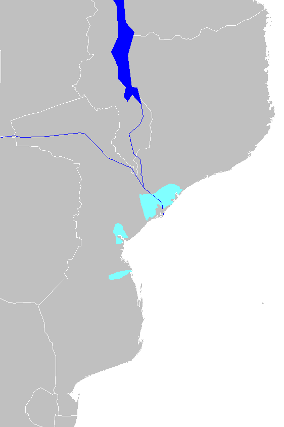 Zambezian coastal flooded savanna ecoregion map